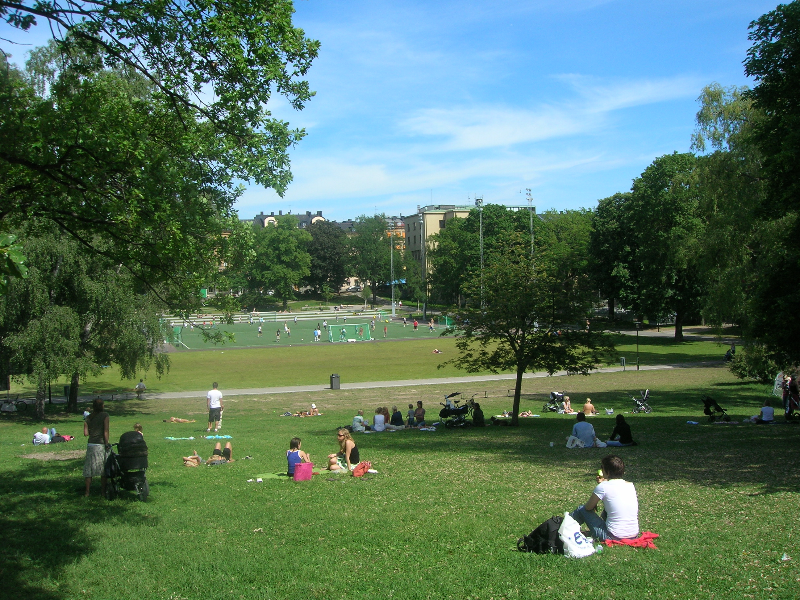 Vasaparken sedd från Parkleken, Stockholm, Sweden.